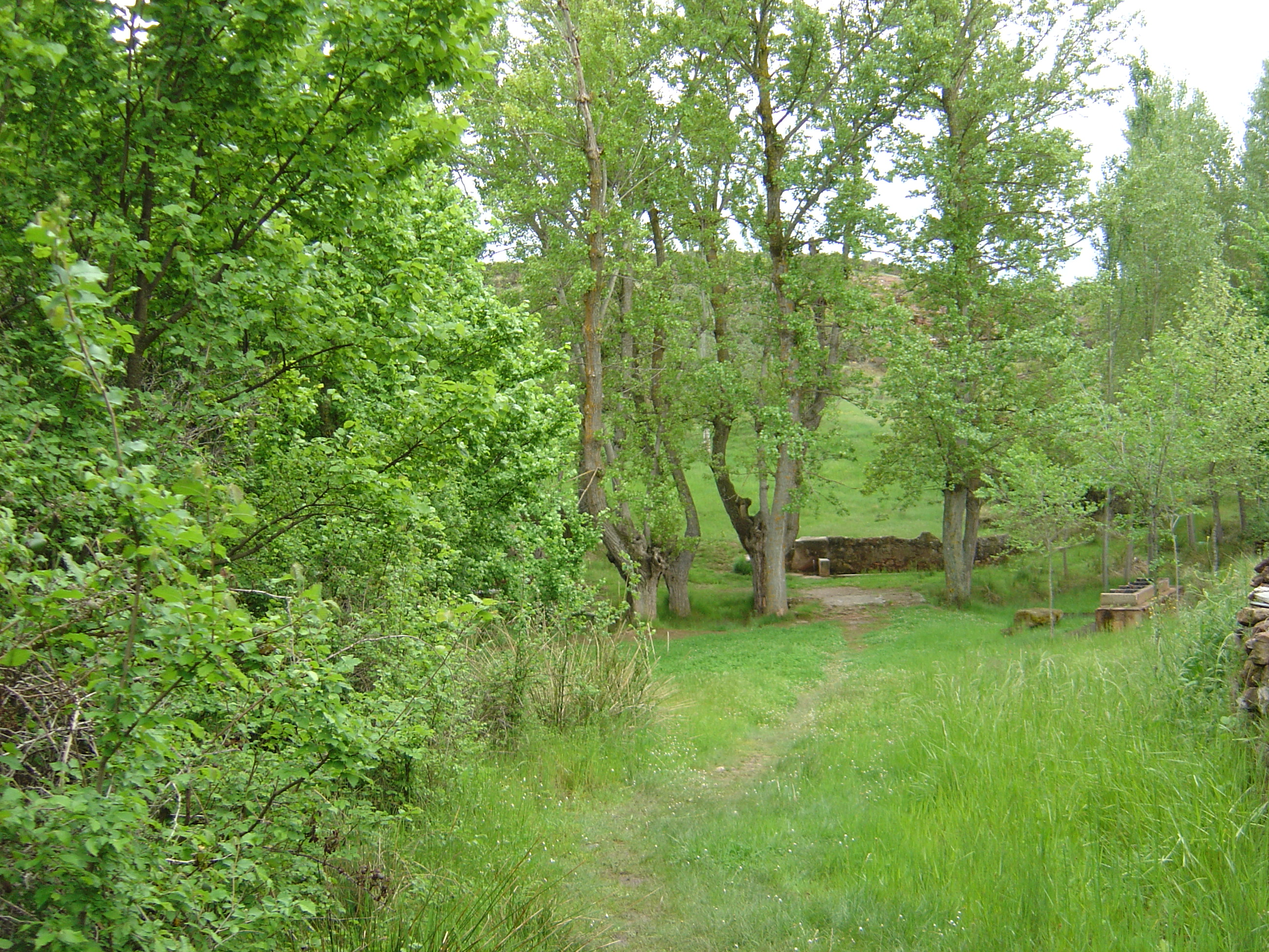 Merendero y fuente de Ujados.